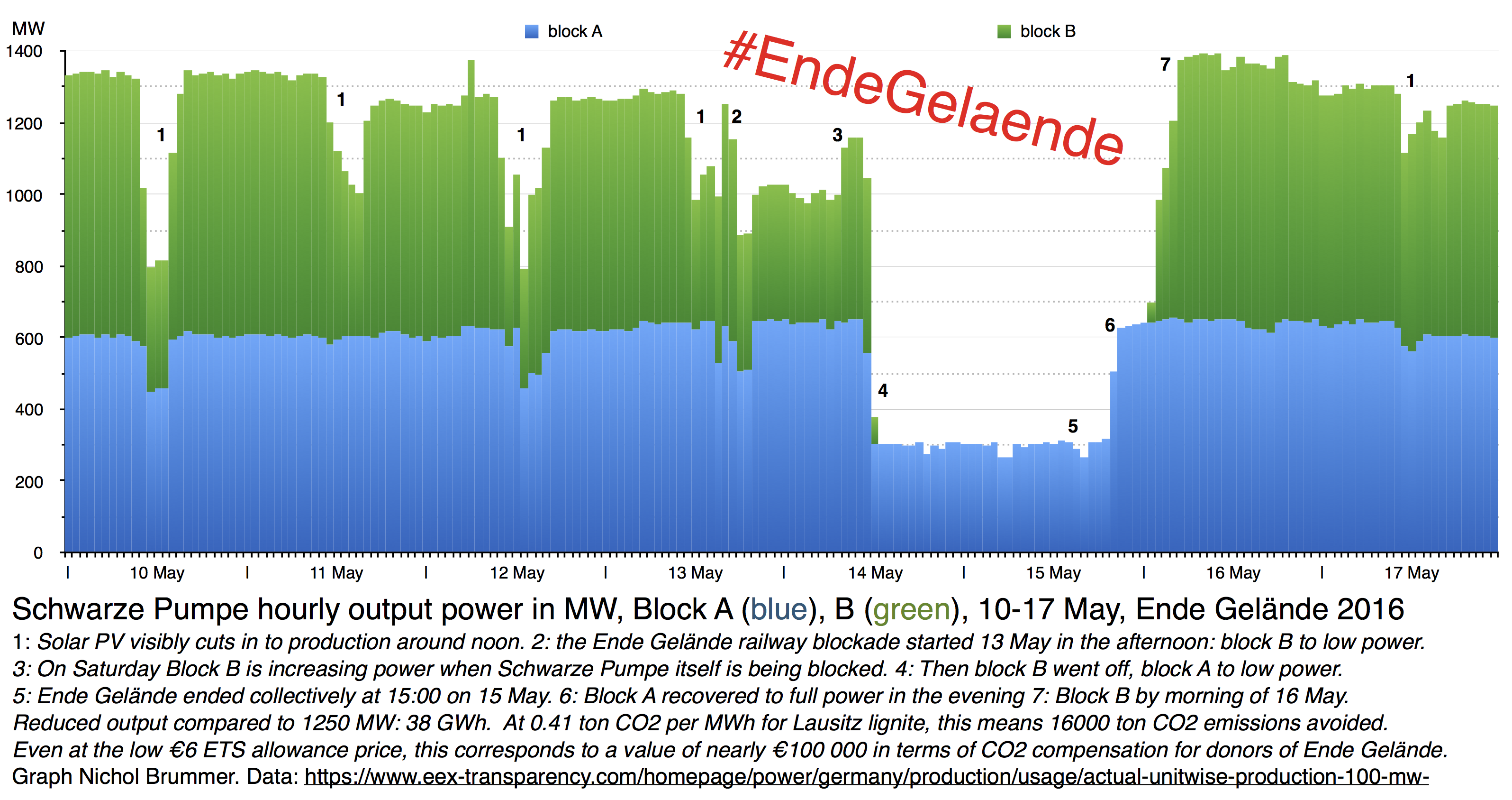 Newer version with short calculation of estimated avoided CO2 emissions, and value this had when converted into ETS allowances